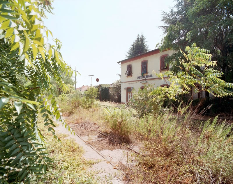 Una panoramica della dismessa stazione di Ponzano Magra.